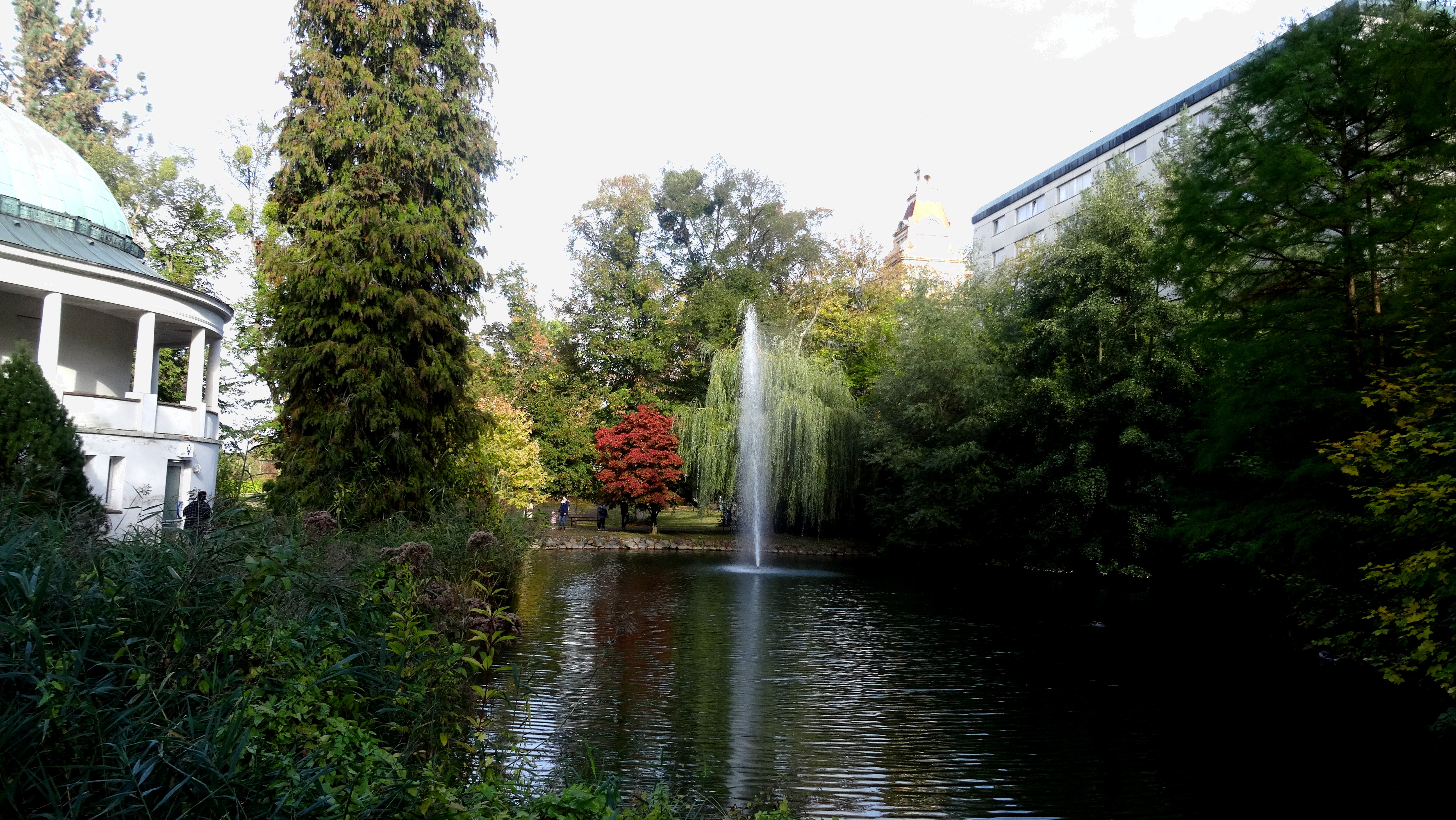 Kurpark Willingen unterhalb der Askeplios Klinik